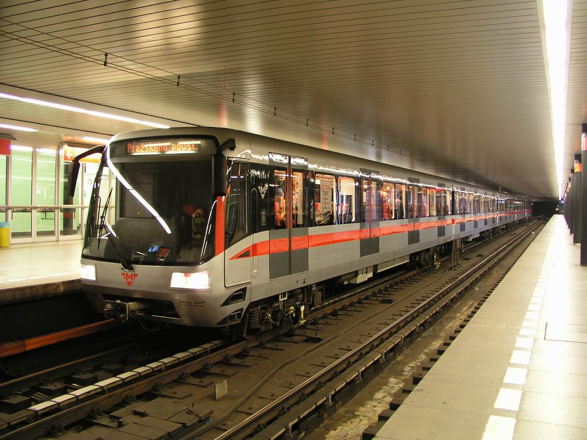 Súprava M1